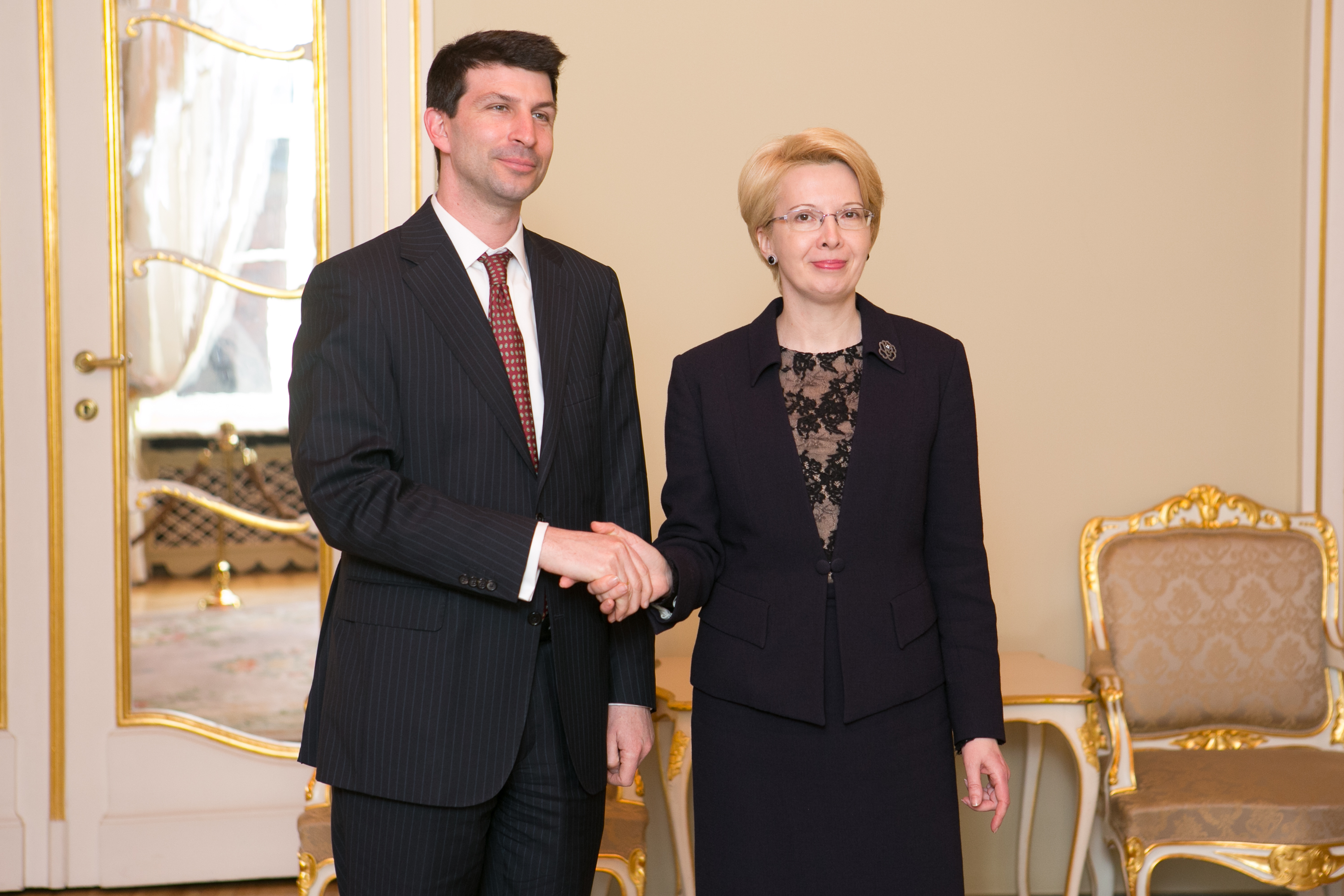 2015.gada 25.marts. Saeimas priekšsēdētāja Ināra Mūrniece tiekas ar Austrijas Republikas ārkārtējo un pilnvaroto vēstnieku Latvijas Republikā Arads Benke (Arad Benkö). Foto:Ernests Dinka, Saeimas Kanceleja Izmantošanas noteikumi: saeima.lv/lv/autortiesibas